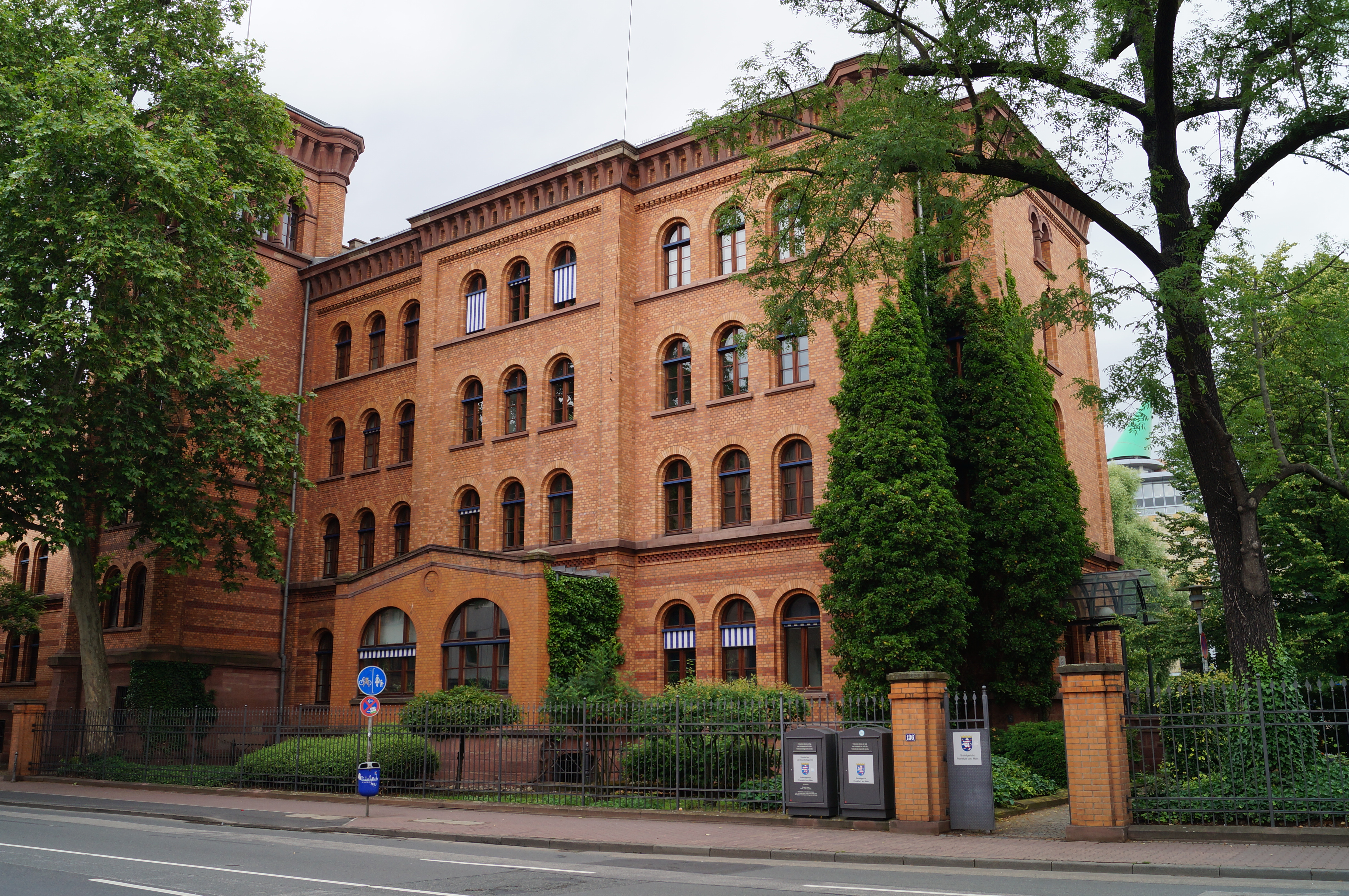 Sozialgericht Frankfurt am Main in der Gutleutkaserne in Frankfurt-Gutleutviertel in der Gutleutstraße